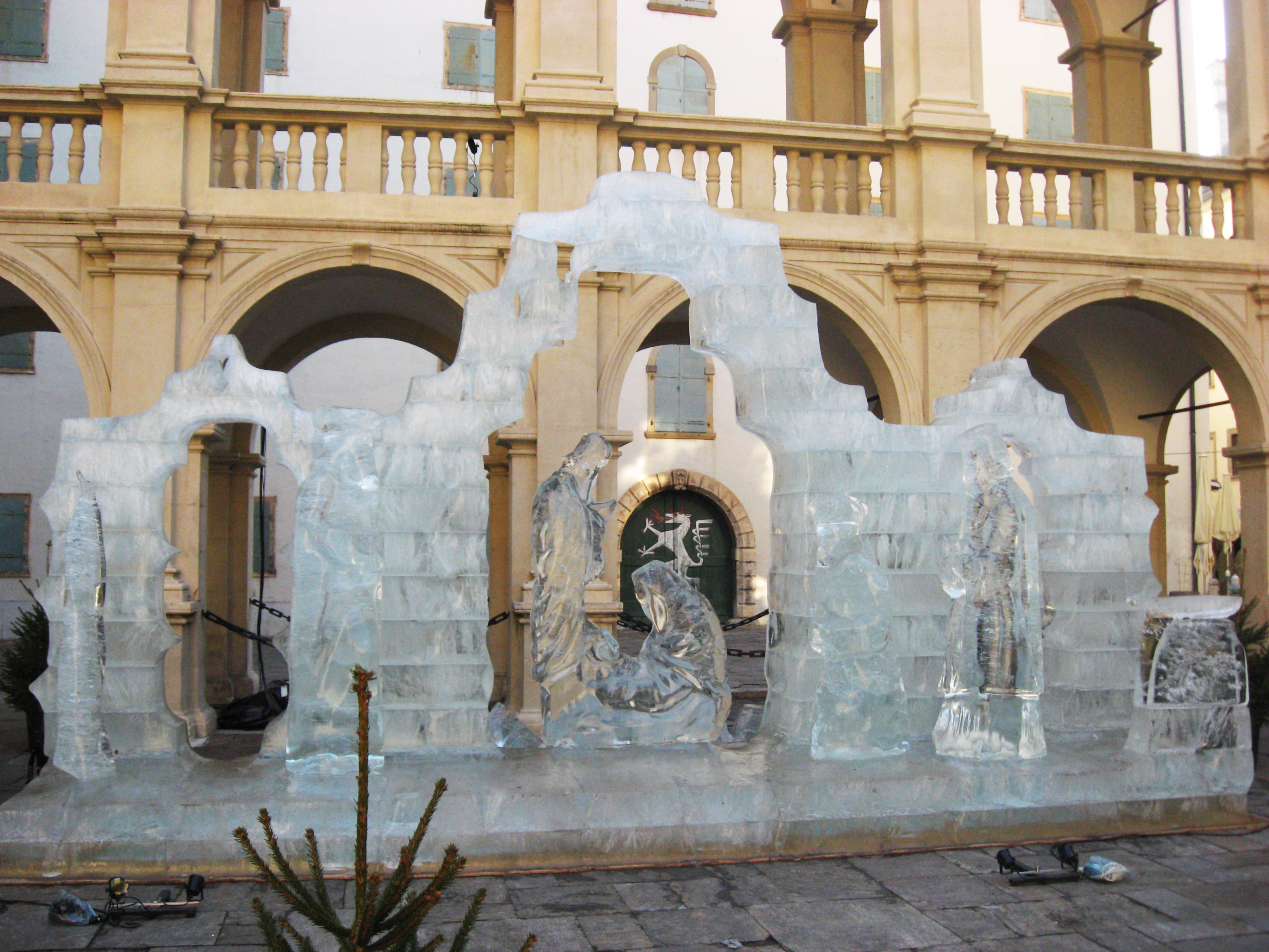 Eiskrippe im Grazer Landhaushof 2011